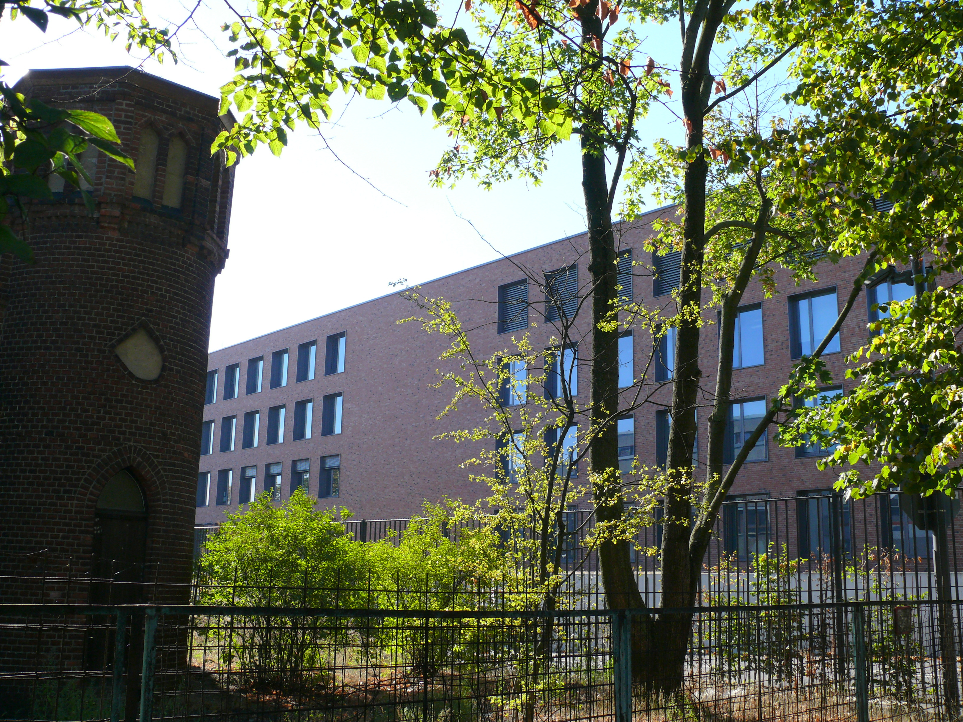 Wedding Seestraße 10 Robert Koch-Institut